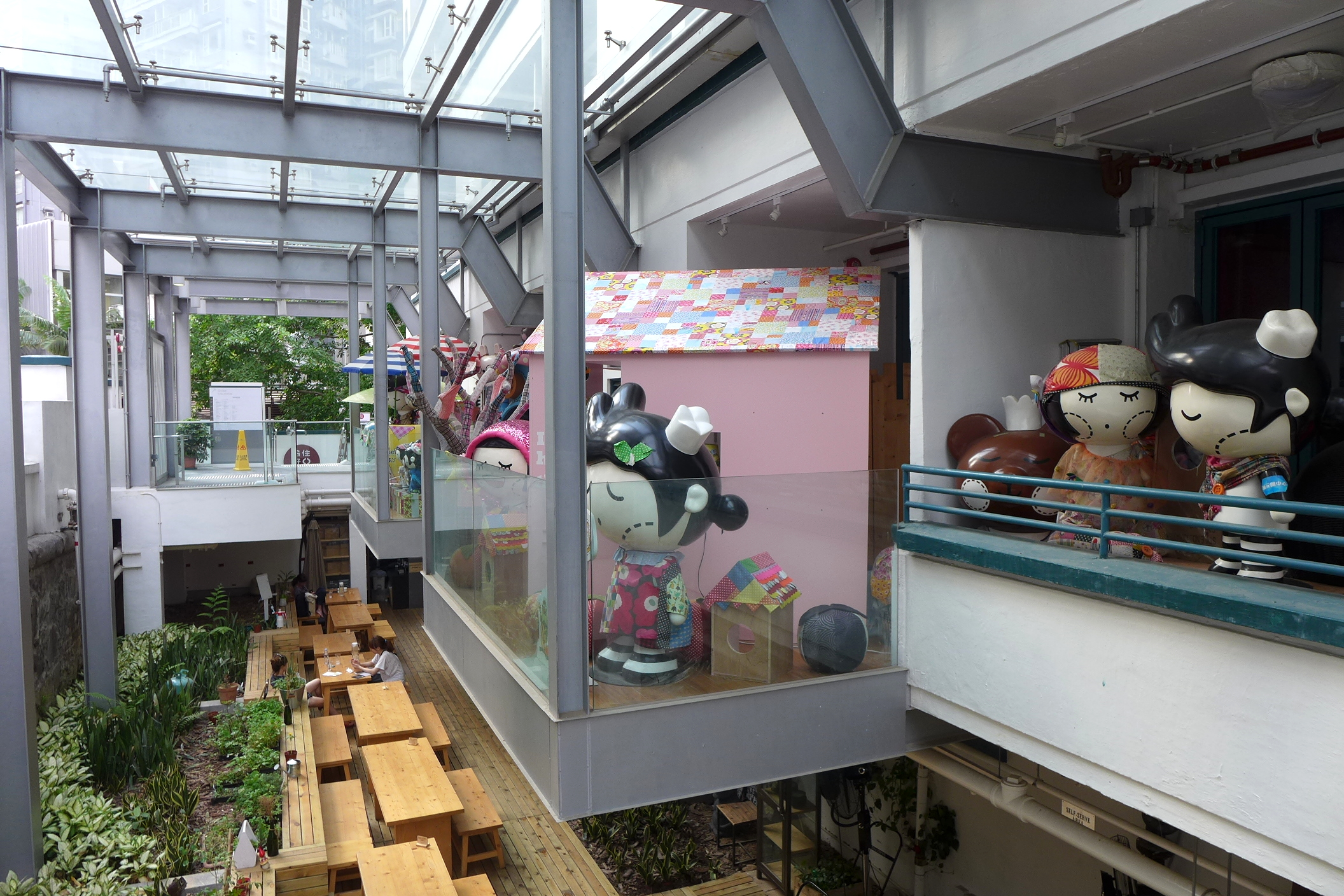 PMQ Level 1 Outside Void